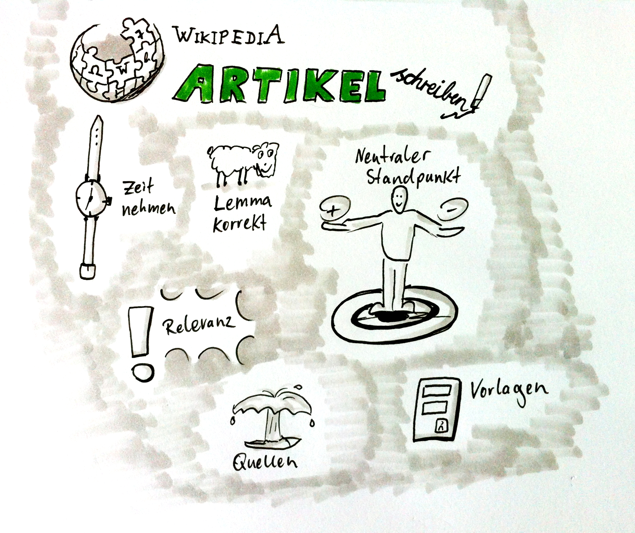 Sketchnote wie man in Wikipedia einen Artikel schreibt, bzw. was zu beachten ist.